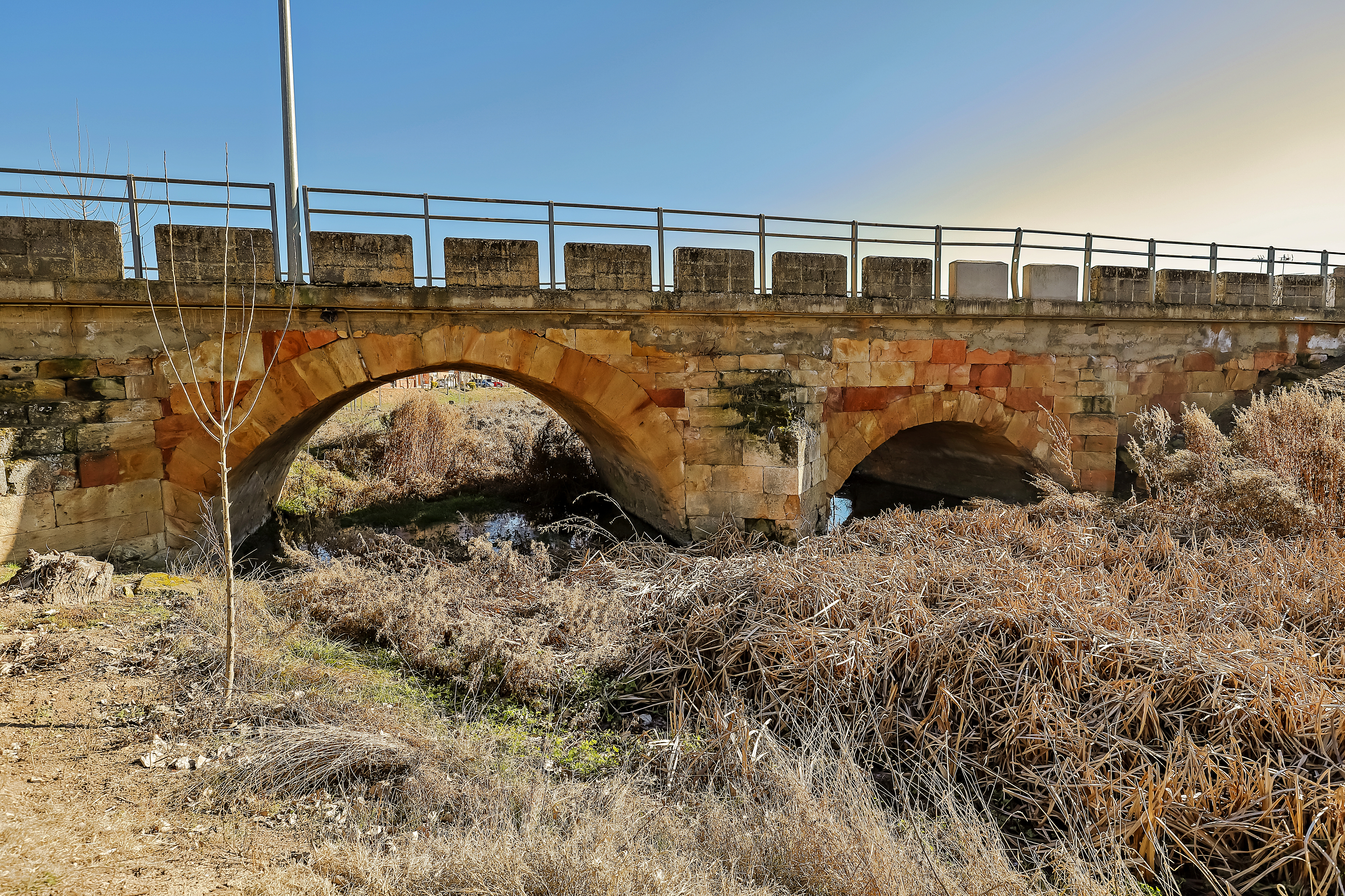 Espino de la Orbada, municipio de la comarca de La Armuña, provincia de Salamanca.